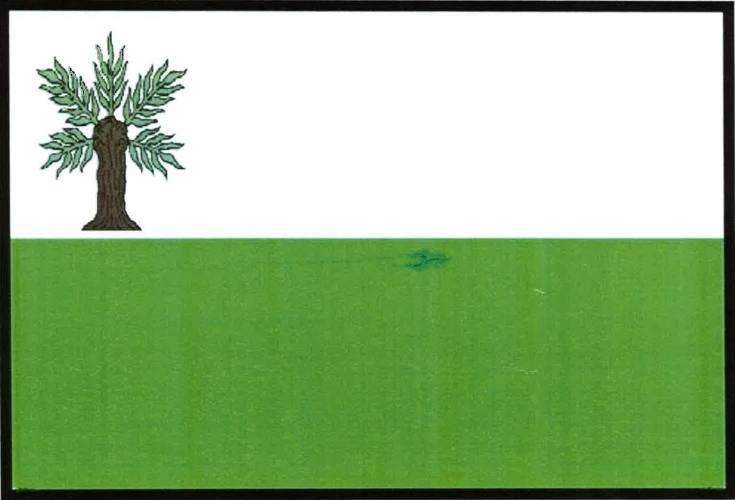 Vlajka, Vidnava, okres Jesení